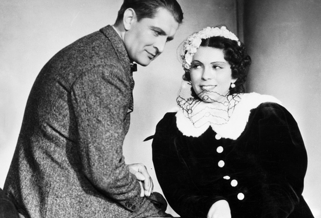 Кадр из фильма "Дочь генерала Панкратова" (пол.Córka generała Pankratowa) (1934, Польша)